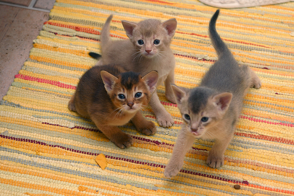 Katzenwurf aus dem Zwinger Gatobelo mit Kätzchen in den Farben Wildfarben, Fawn und Blau (v.l.n.r., Alter 4 Wochen).